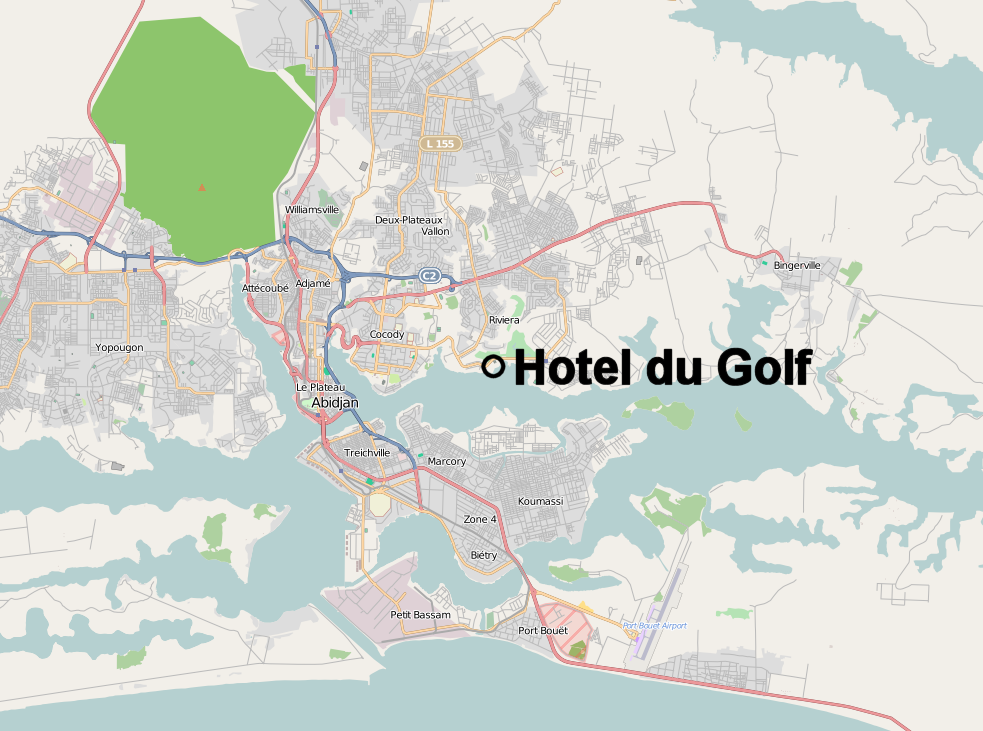 Karte Hotel du Golf